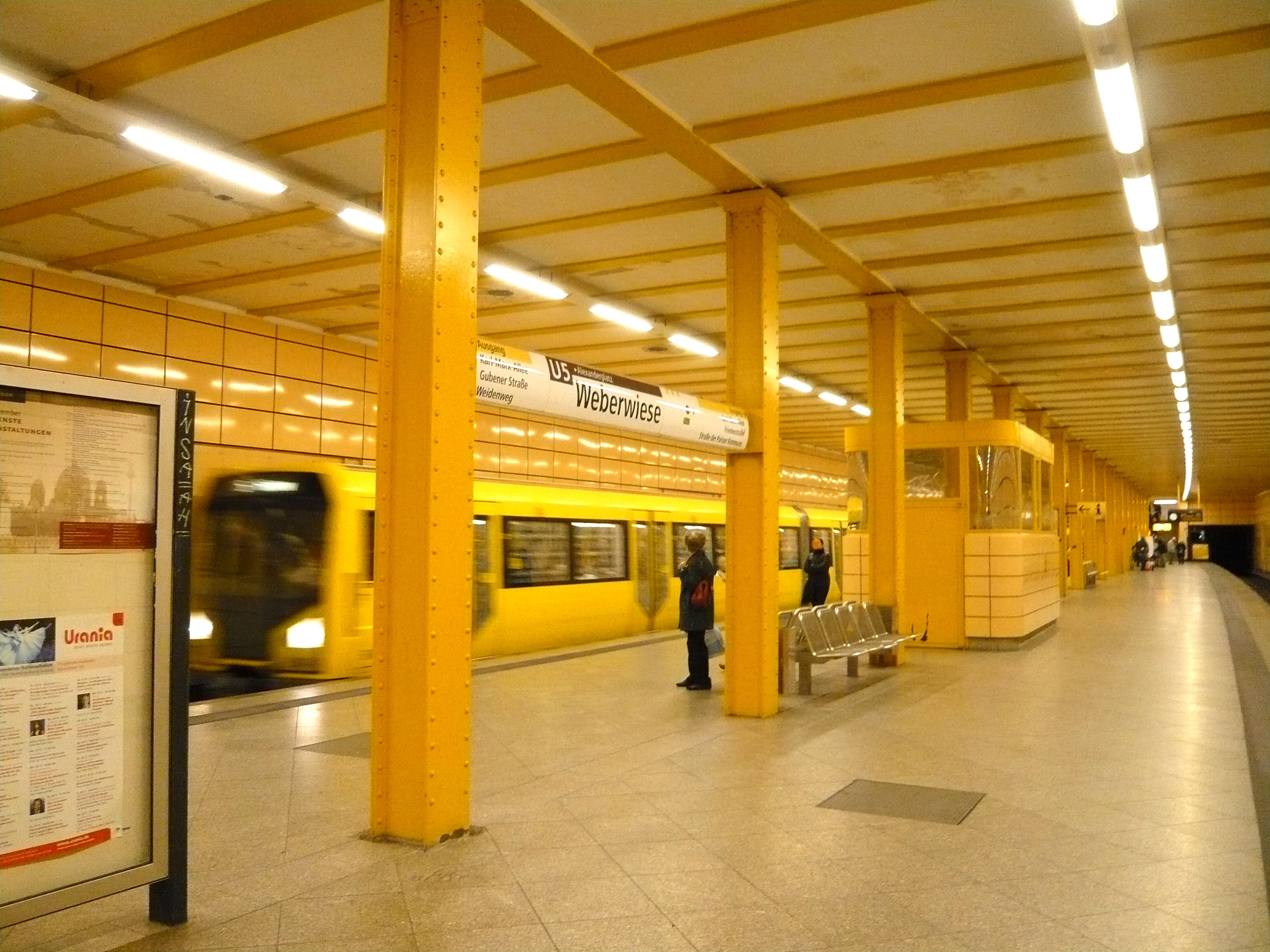 Straße im Ortsteil Berlin-Friedrichshain/